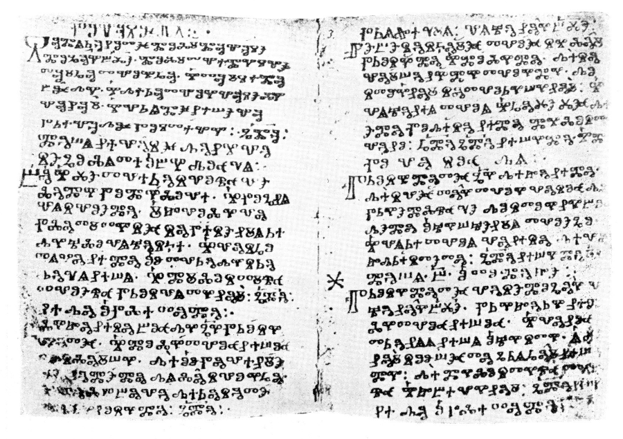 Kyjevské listy, hlaholský rukopis kolem roku 900